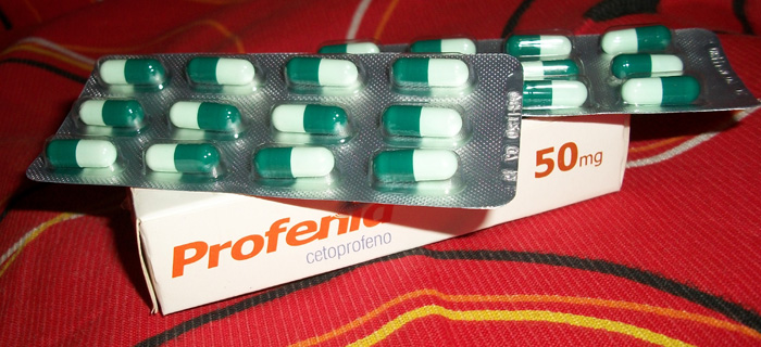 Embalagem primária e secundária do Profenid (cetoprofeno).